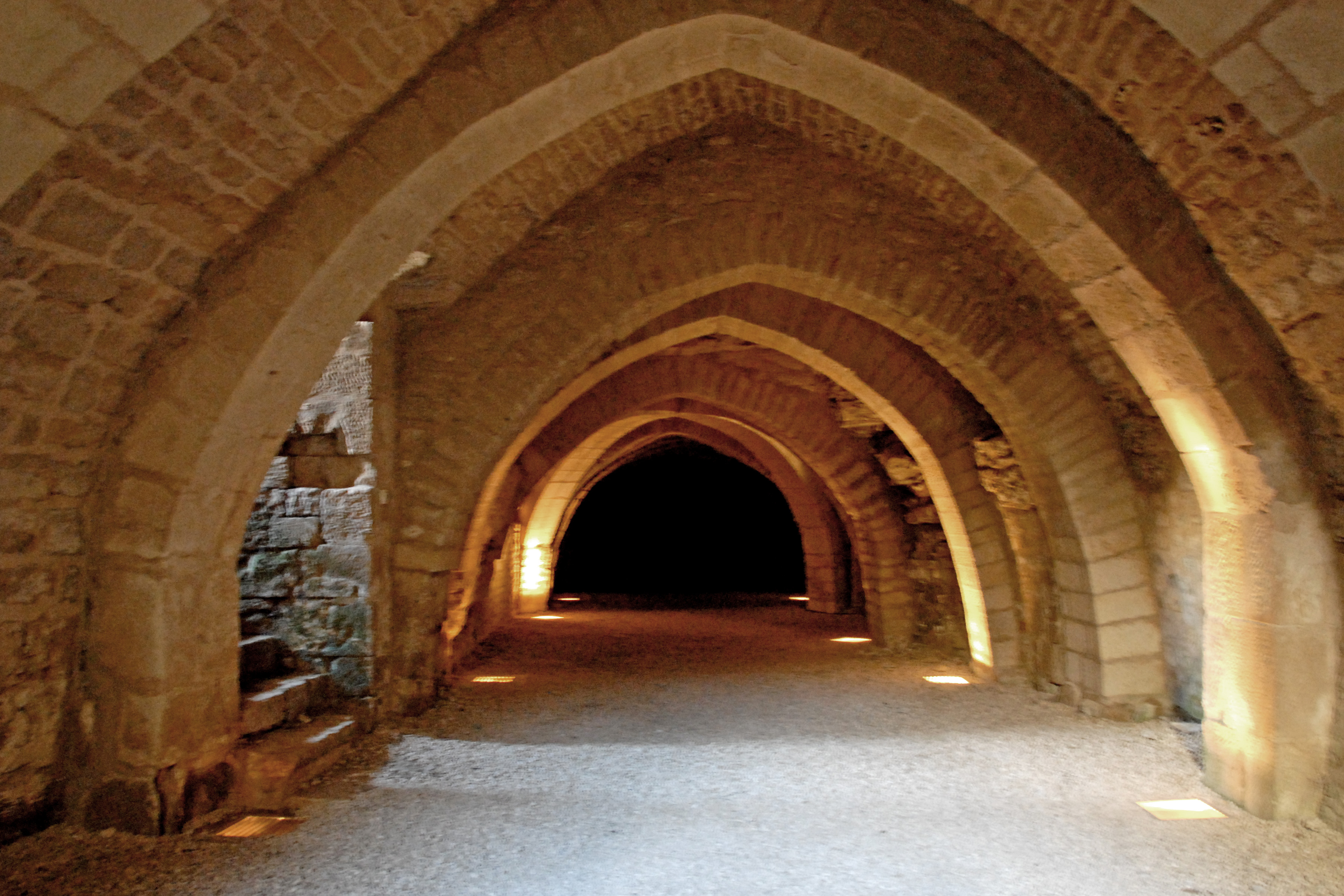 Maillezais, Keller neben der Südgalerie